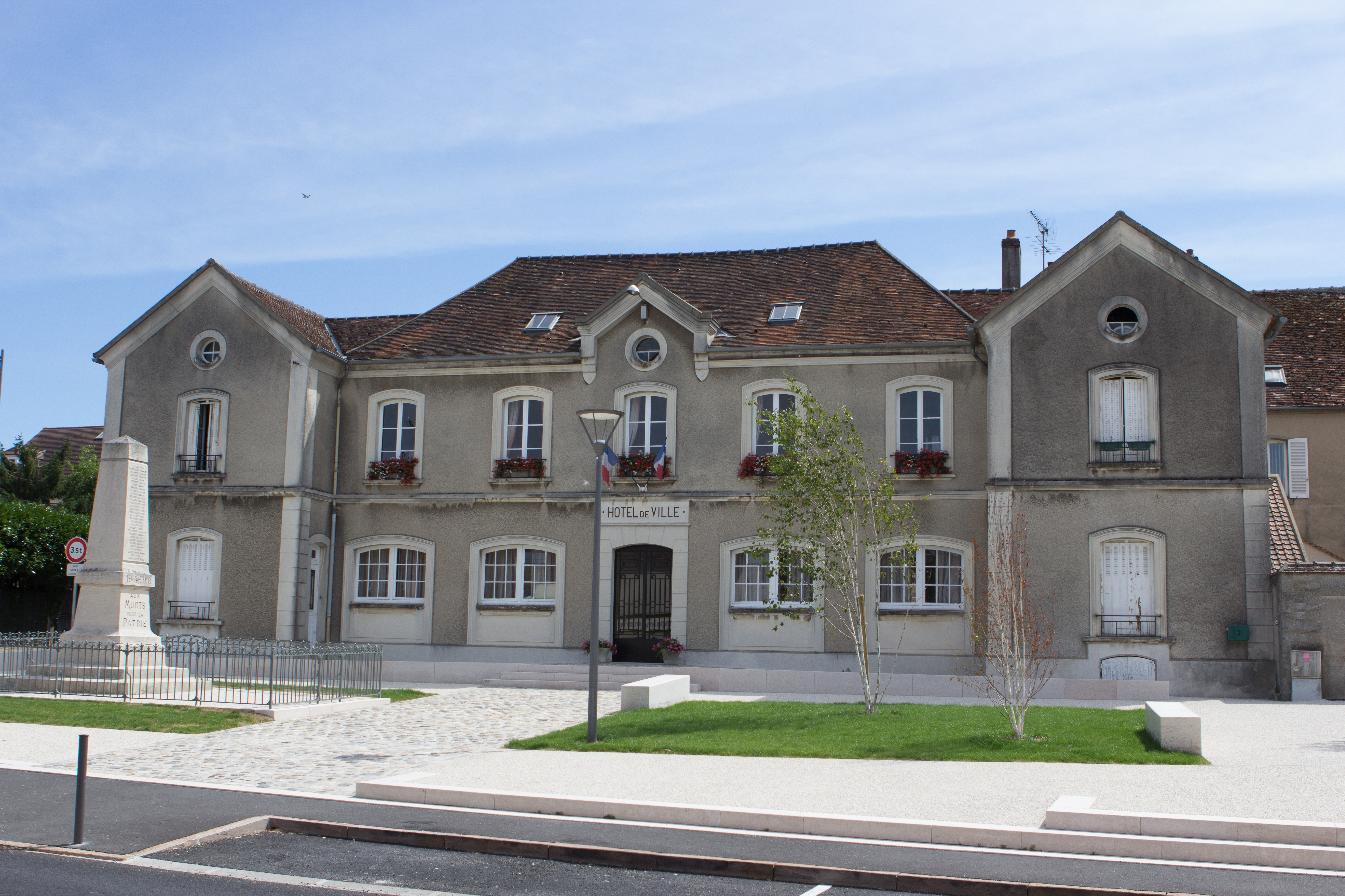 Mairie de Guignes / Guignes, Seine-et-Marne, France